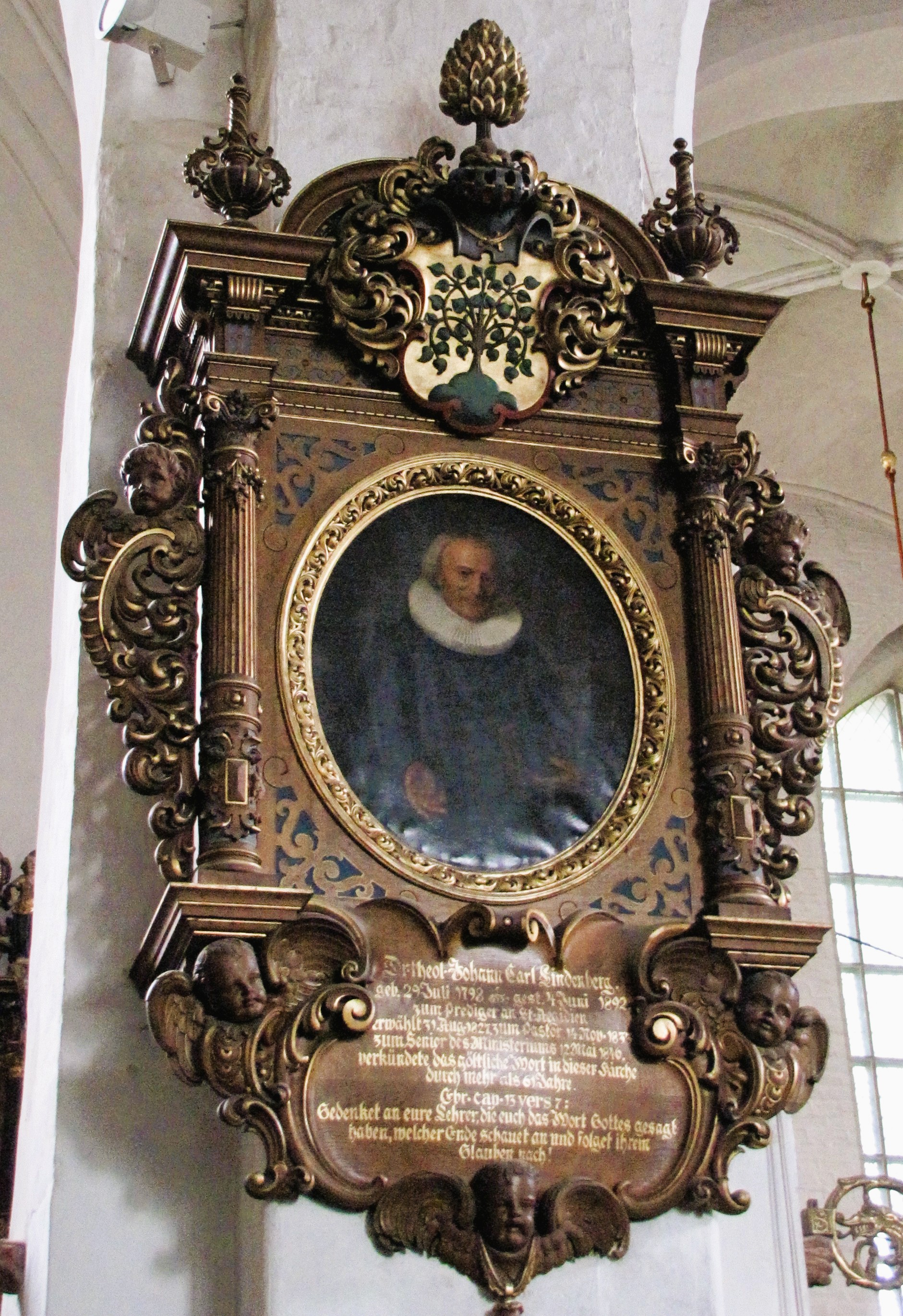 Epitaph for Pastor and Senior Johann Carl Lindenberg (1798-1892) in St. Aegidien, Lübeck